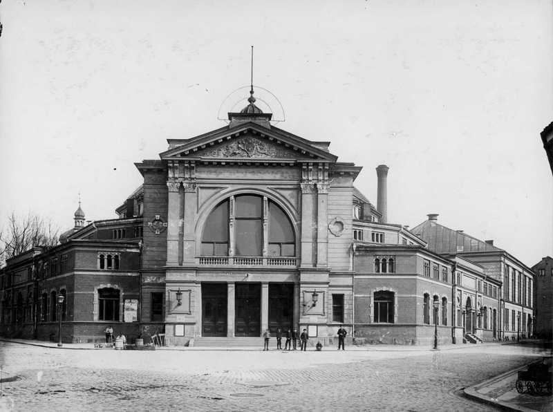 Cirkusbygningen, menn, gravearbeid, gutter.